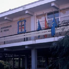 Ayuntamiento de Gozón